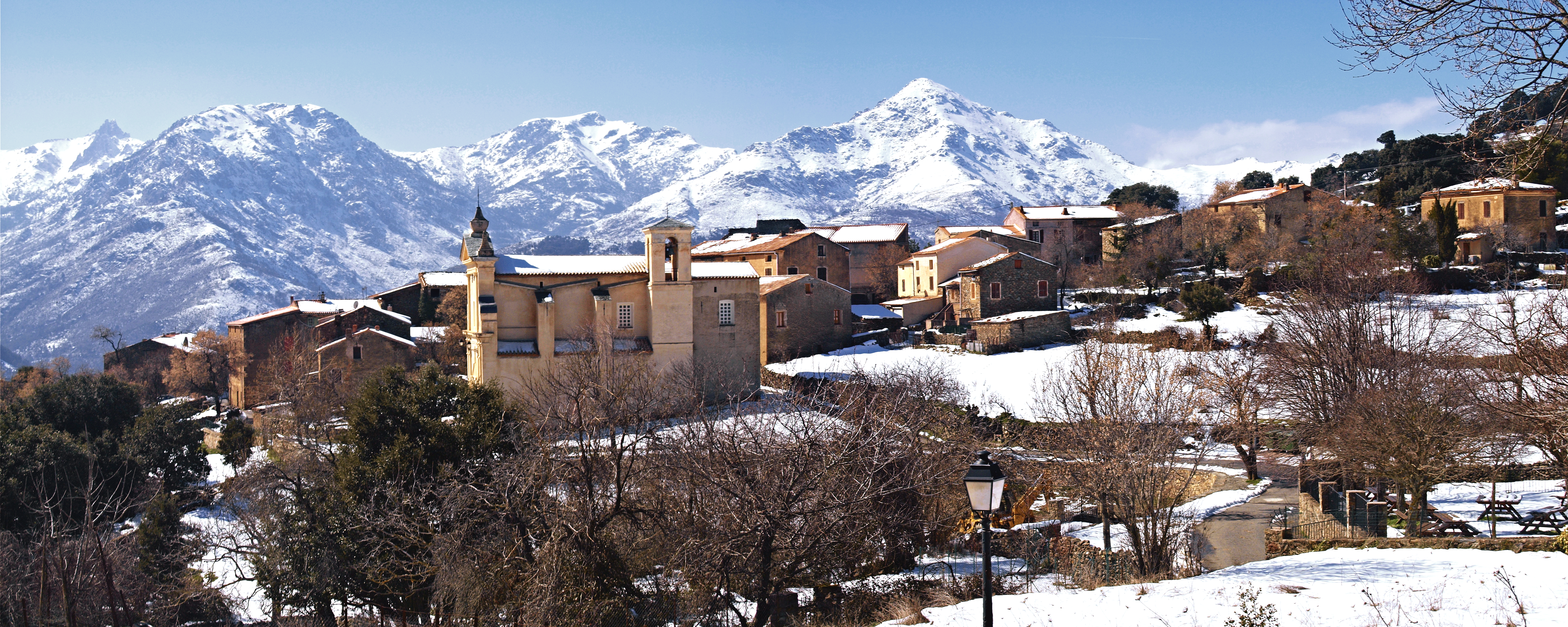 Vallica (Corsica) - Panorama du village